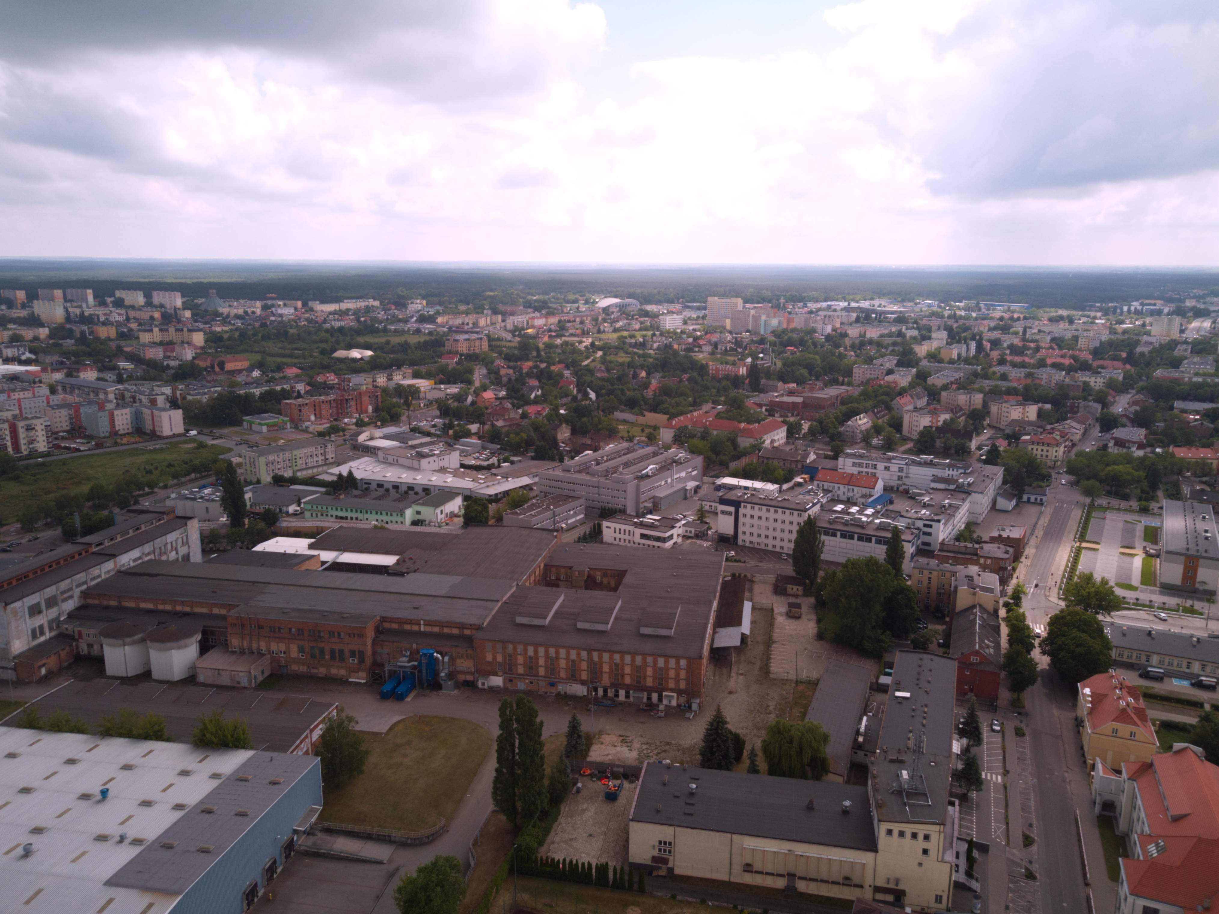 Styk Śródmieścia i Kazimierza Wielkiego (2020 r.)